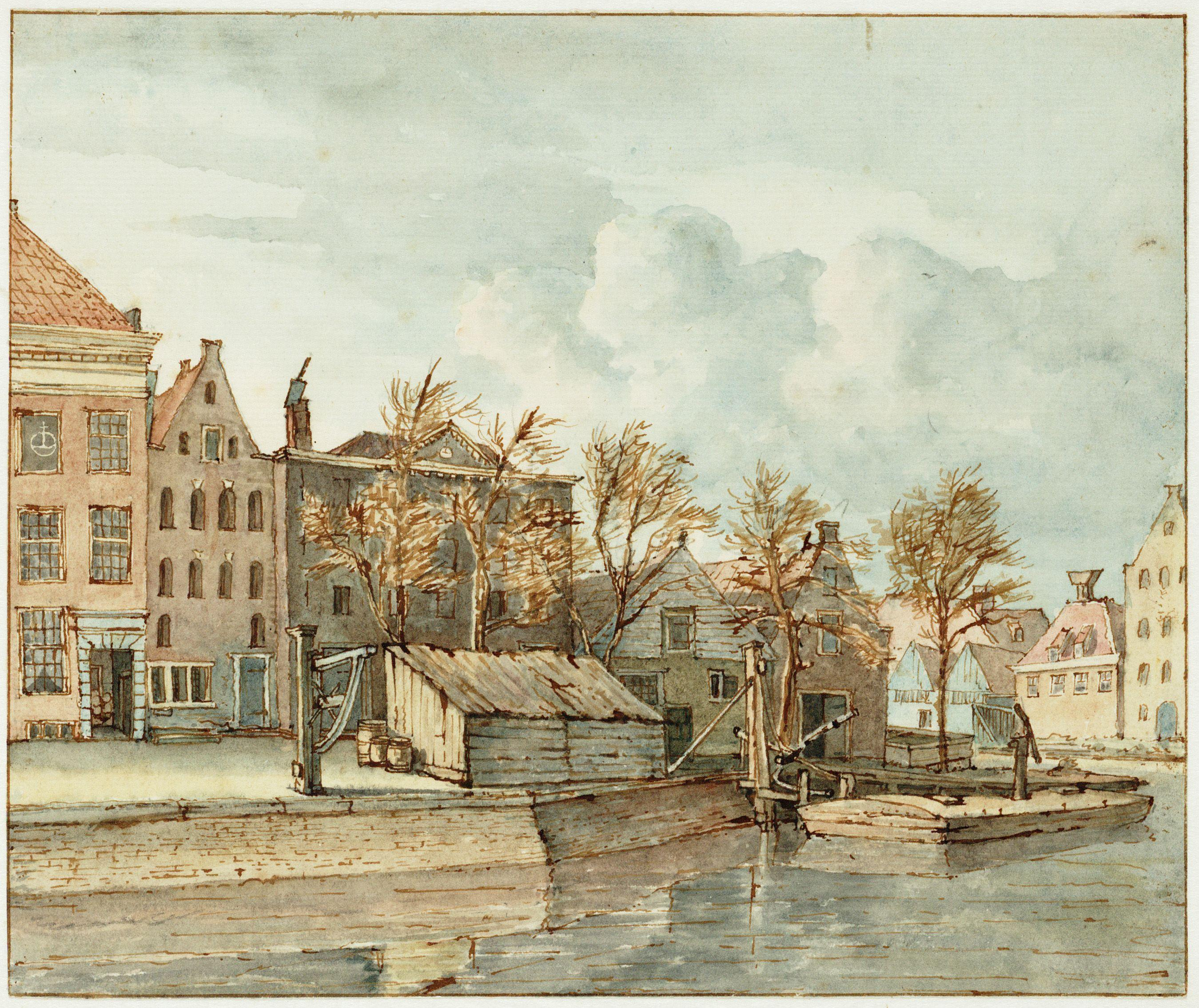 Beschrijving Gezicht op de Brouwerij De Waereld De Houtkopersburgwal met brouwerij De Wereld op het eiland Uilenburg. Rechts de ingang van de Uilenburgergracht en de gevels van enkele panden op het eiland Marken. Rechts, in de gracht, een waterschuit. De brouwerij sloot op 1 januari 1833. Later verrees op deze en de aangrenzende percelen de diamantslijperij Boas. Documenttype tekening Vervaardiger Lamberts, Gerrit Collectie Collectie Van Eeghen: tekeningen Datering 1816 Geografische naam Uilenburgergracht Nieuwe Uilenburgerstraat Houtkopersburgwal Uilenburg Inventarissen Afbeeldingsbestand 010055000553